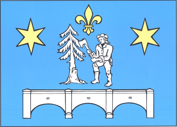 vlajka,Herálec , okres Žďár nad Sázavou